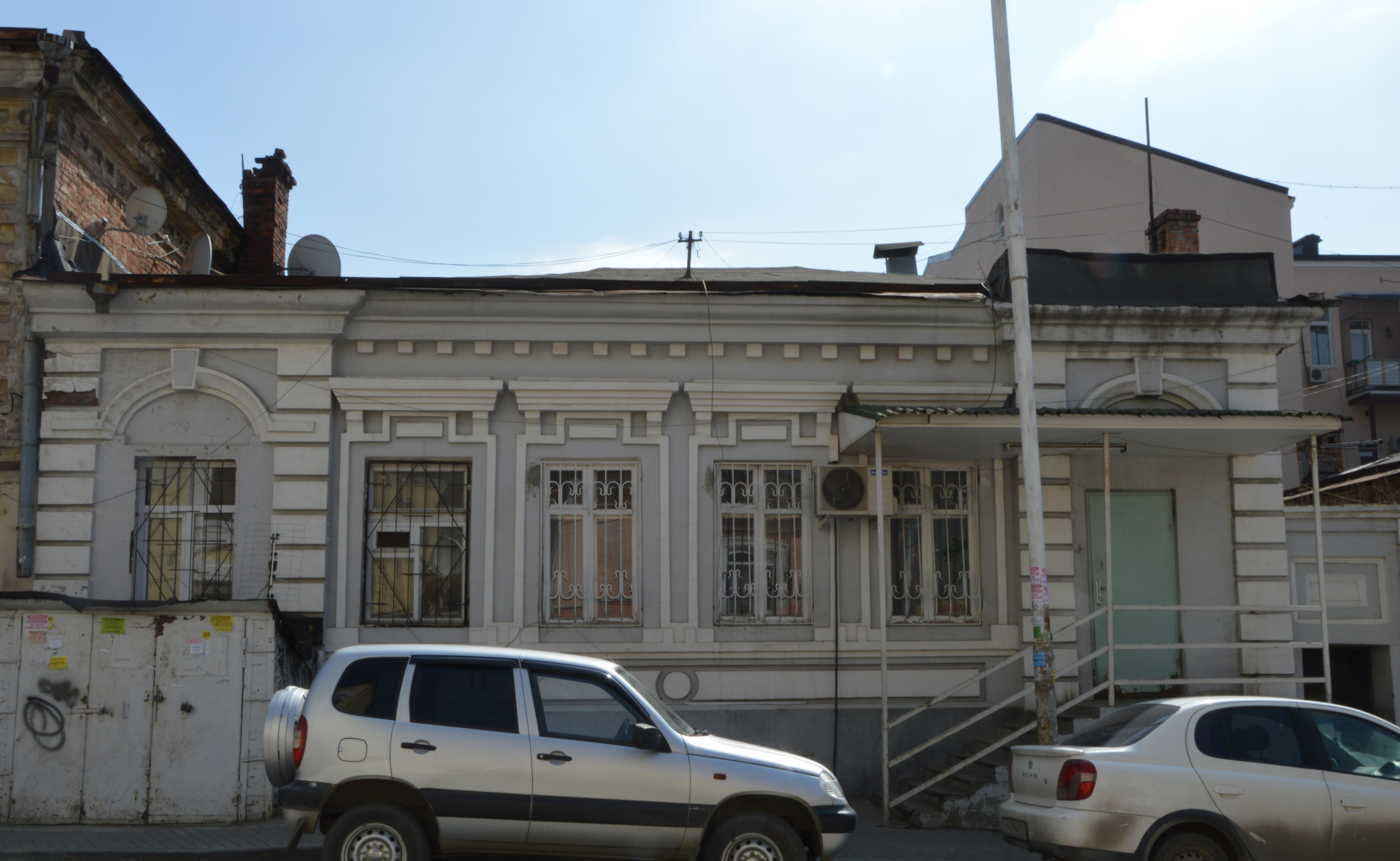 Здание города Ростова-на-Дону